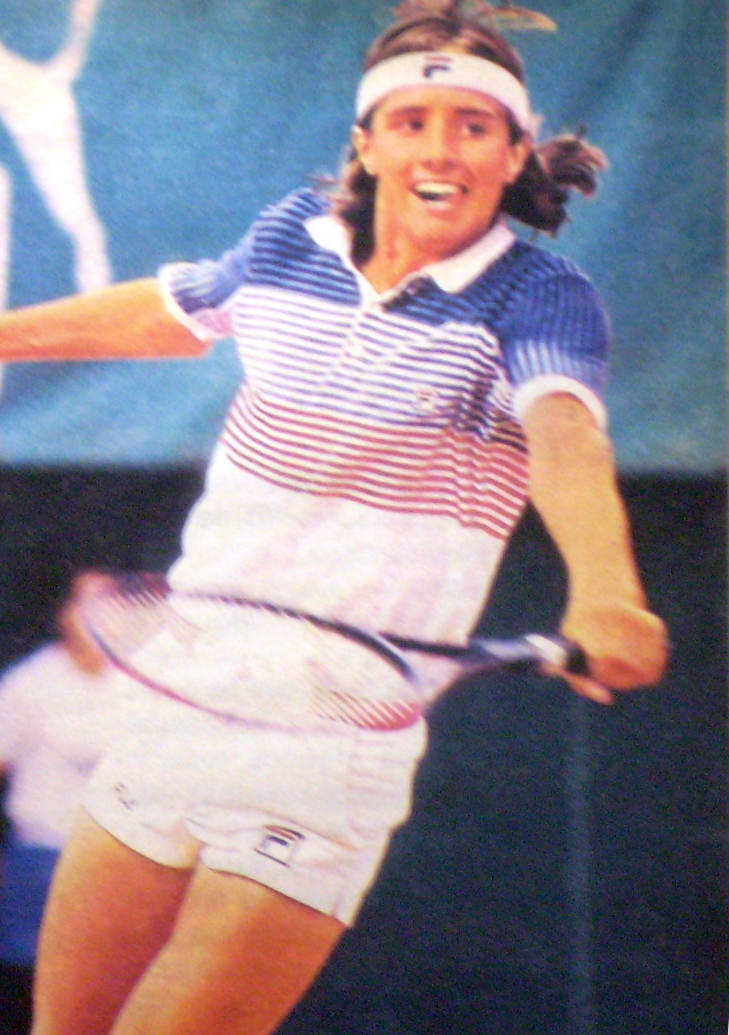 Horacio de la Peña